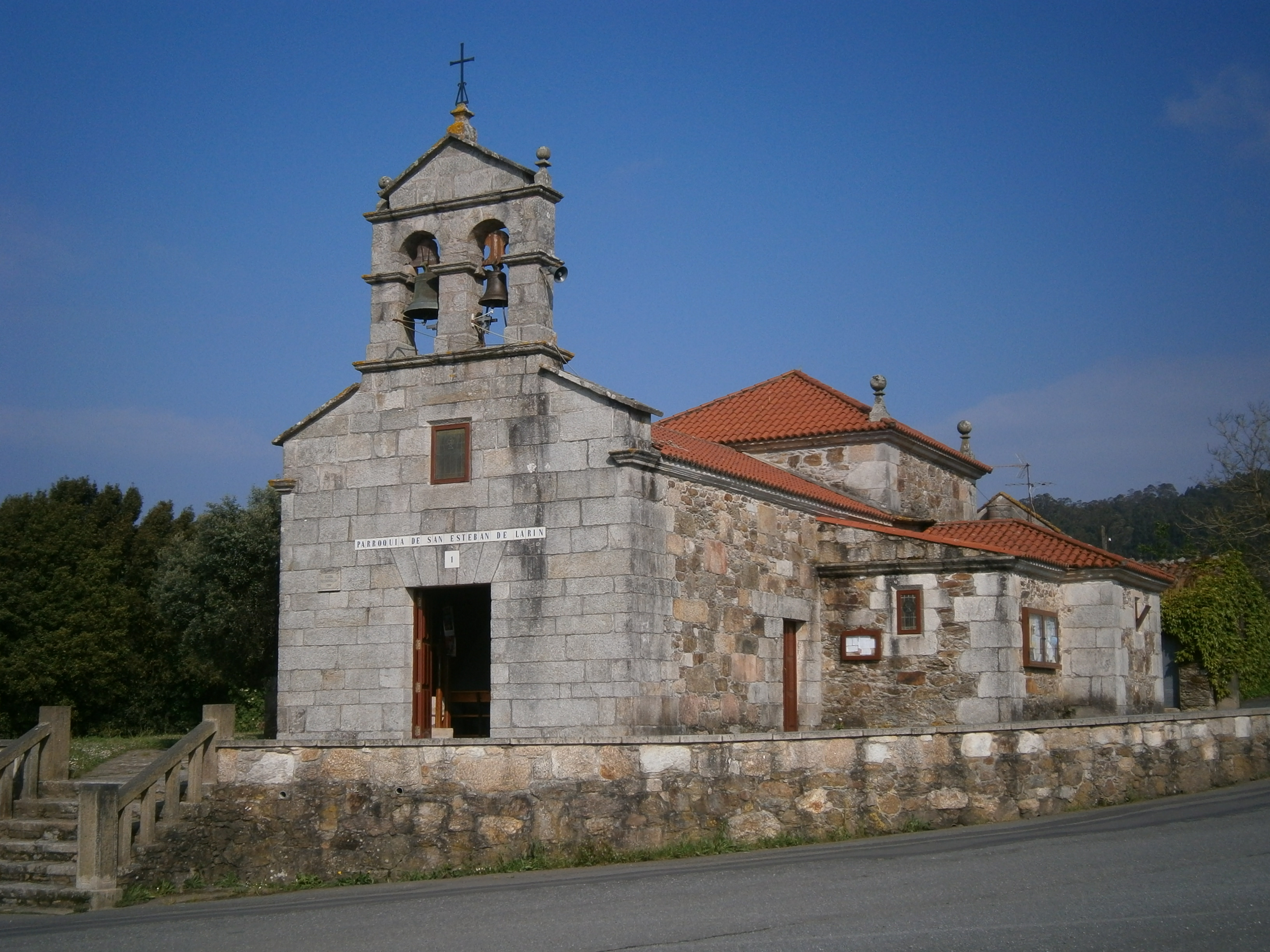 Igrexa de Santo Estevo de Larín, Arteixo